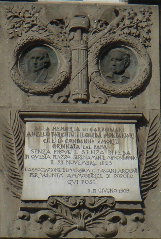 Roma, piazza del Popolo, Caserma Acqua. Lapide in memoria dei carbonari Angelo Targhini e Leonida Montanari, fatti giustiziare dal papa-re nel 1825.